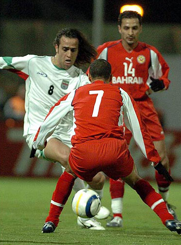 علی کریمی در بازی انتخابی جام جهانی ۲۰۰۶ / ایران ۰ - بحرین ۰ -/ بهمن ۱۳۸۳